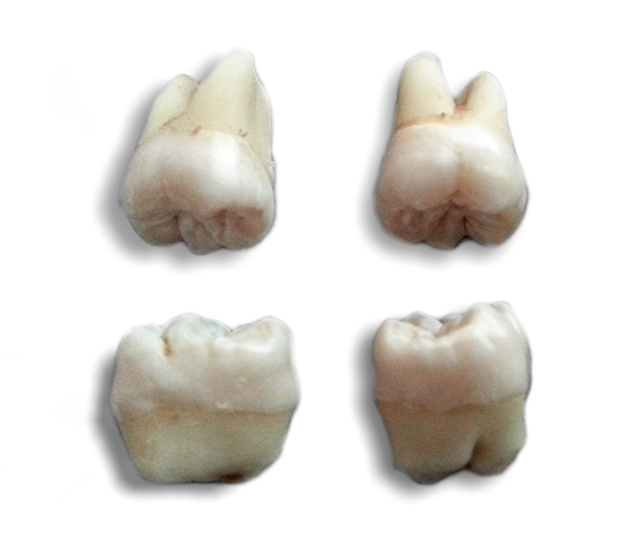 Alle vier Weisheitszähne